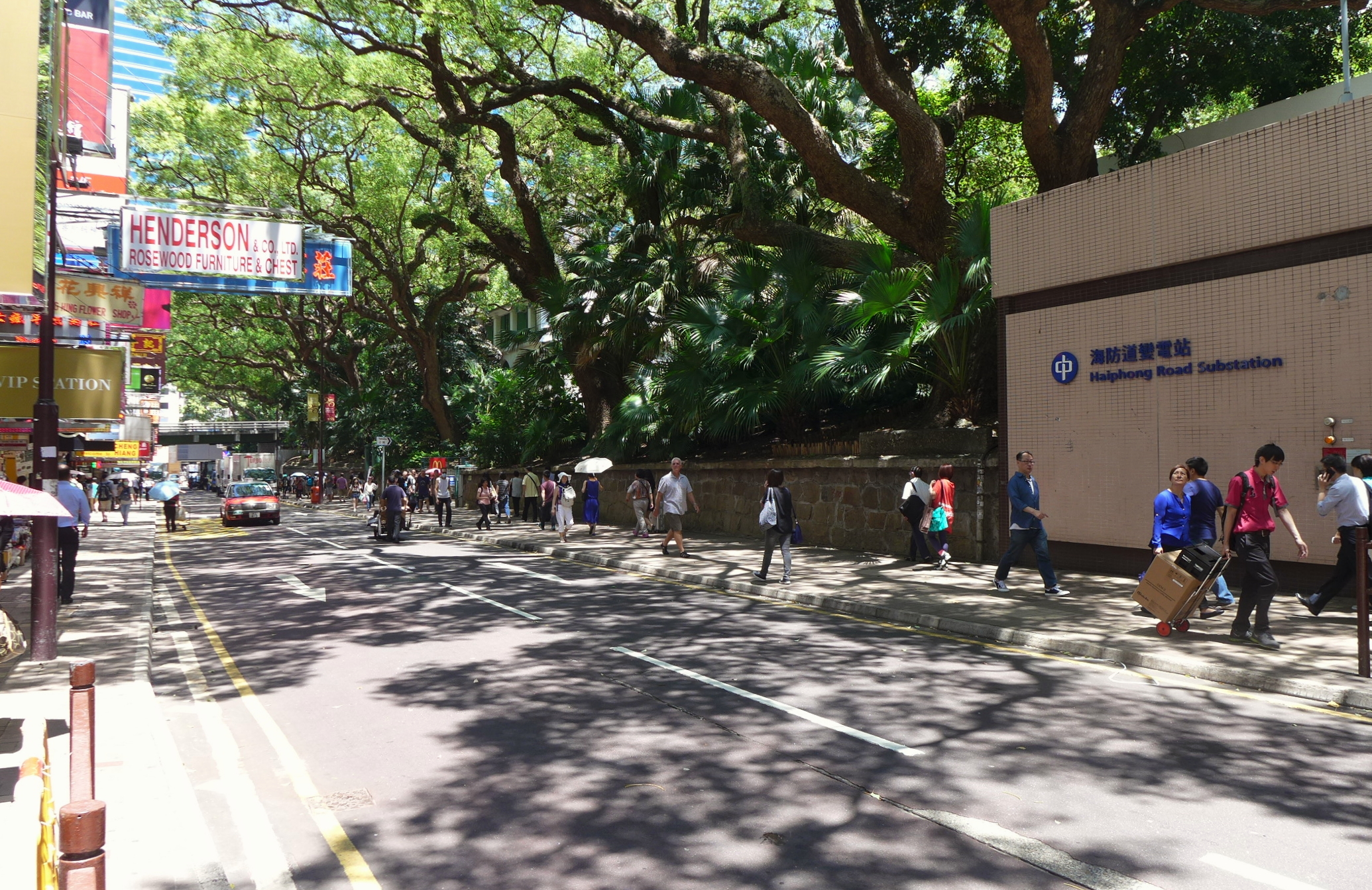 Haiphong Road